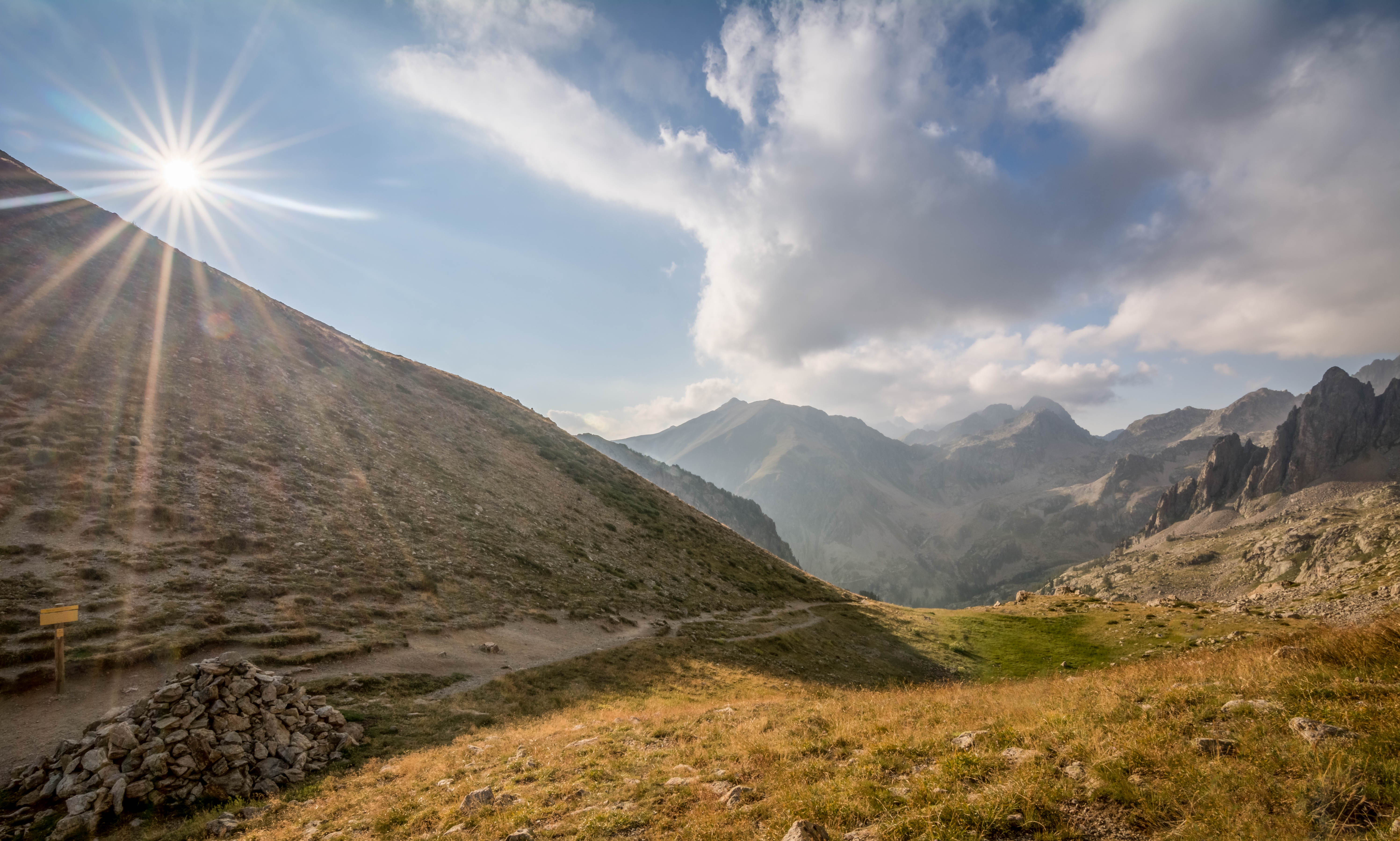 Cette photo a été prise dans le Parc Naturel Régional du Mercantour au niveau de la Baisse des Cinq Lacs.